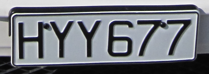 Eigen kenteken voor